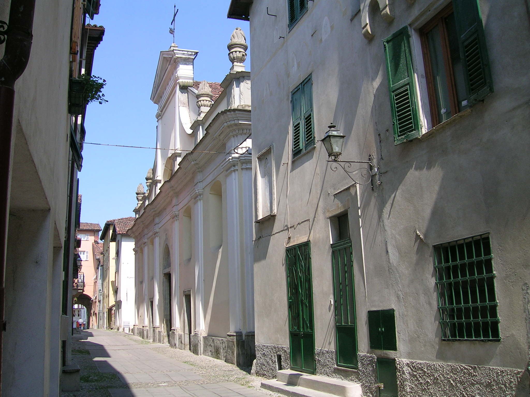 S. Giacomo Maggiore, Arquata